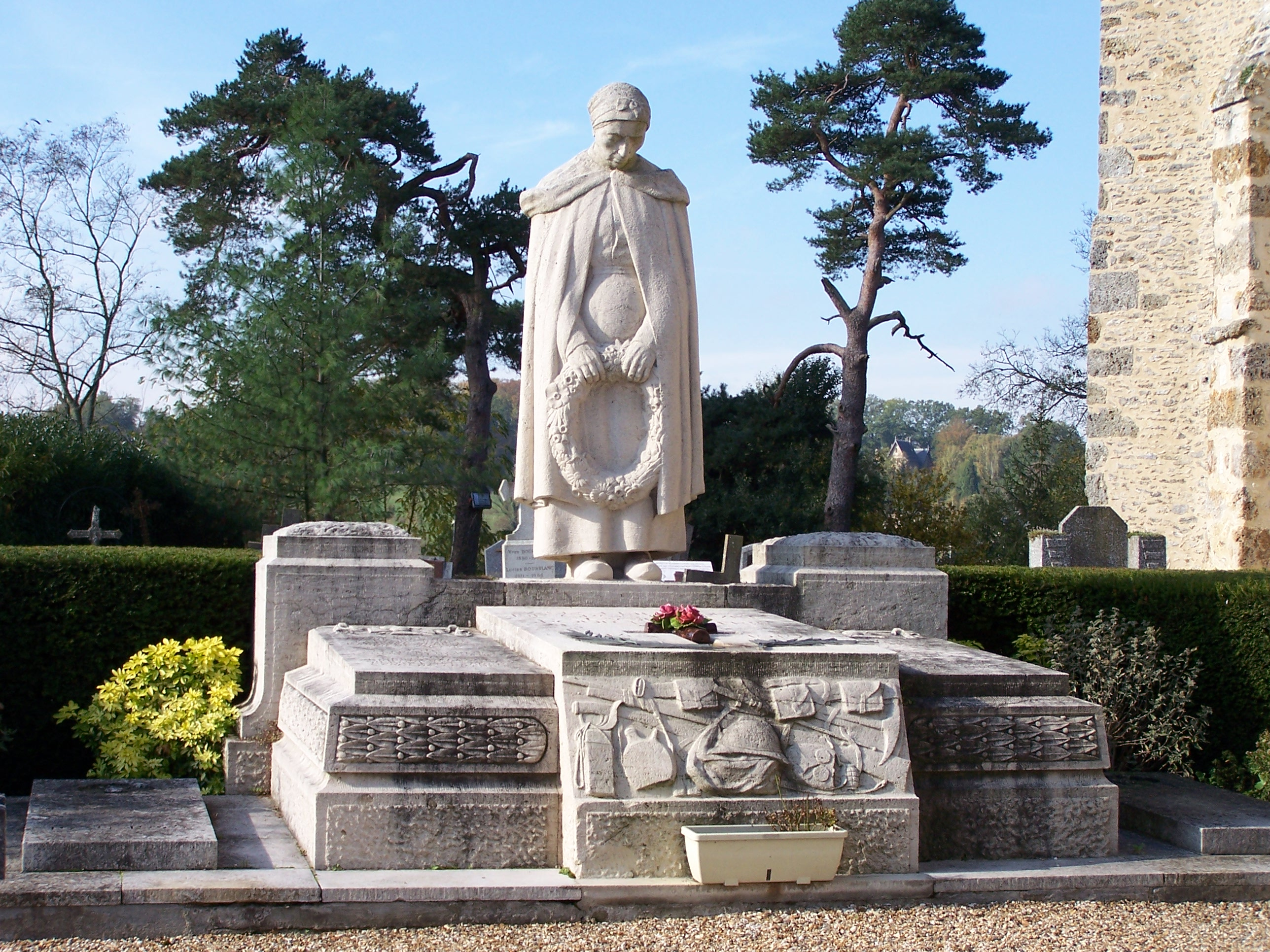 Monument aux morts de Grosrouvre (Yvelines, France)